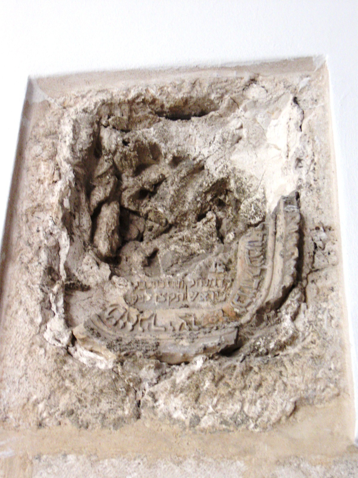 ביקור מודרך בבתי הכנסת הספרדיים